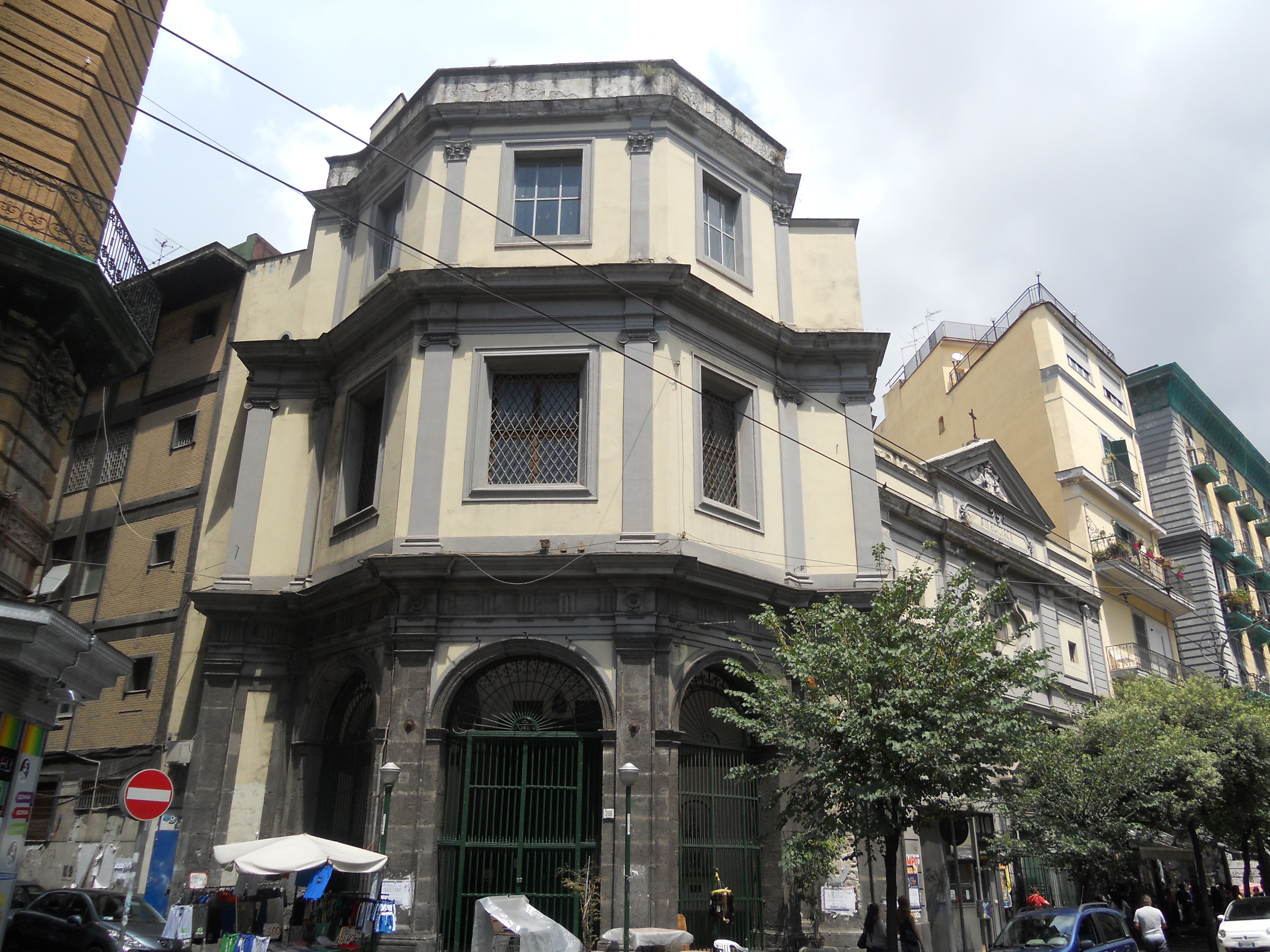 Prospetto esterno di Santa Maria Egiziaca all'Olmo, Napoli